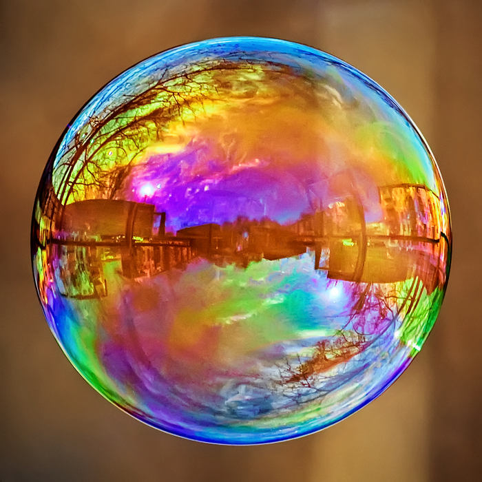 Интерференция отраженного света от поверхности мыльного пузыря